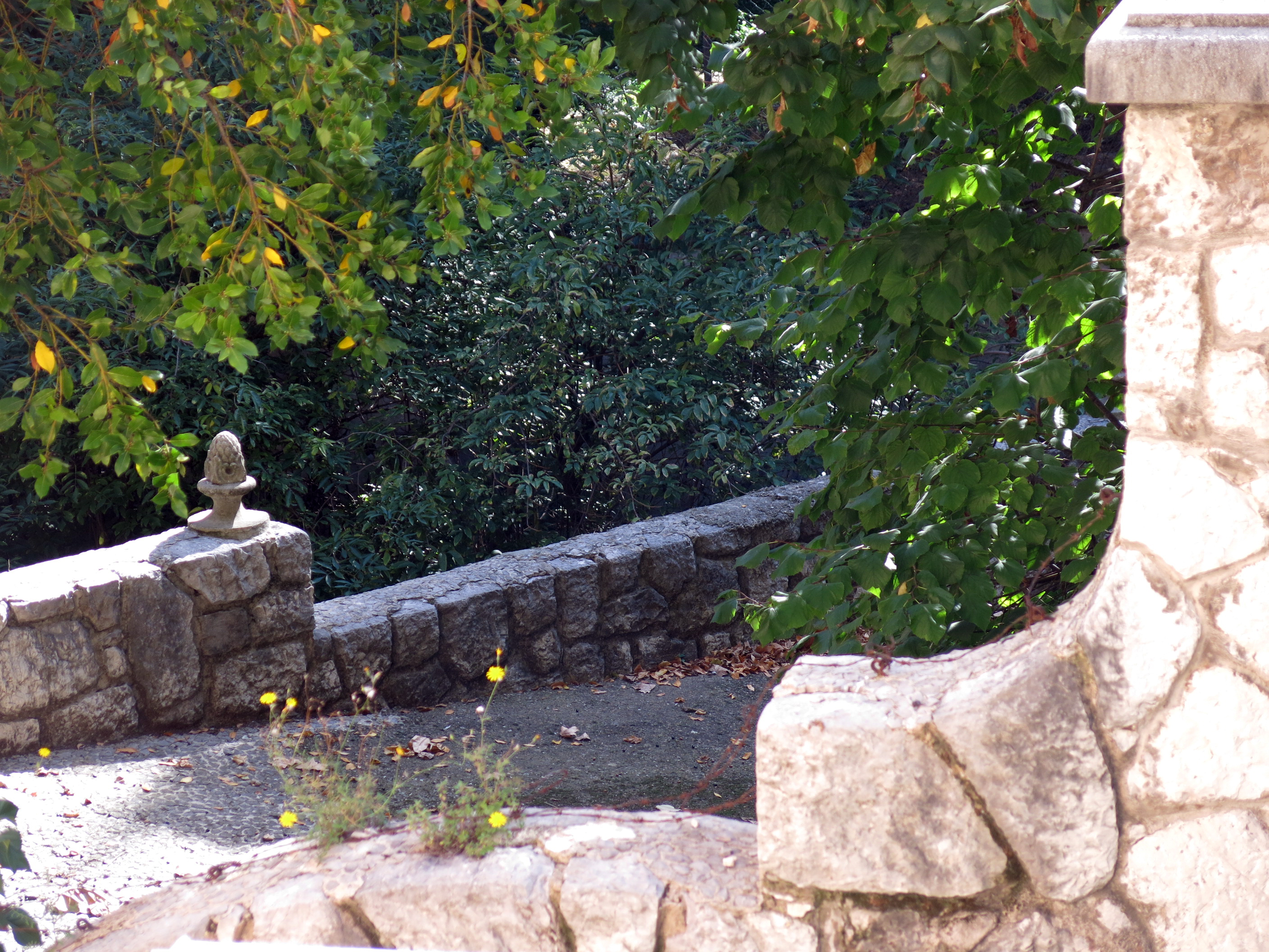 Pont de Pedra de Can Pratmarsó, o Can Xicorrei (Centelles)